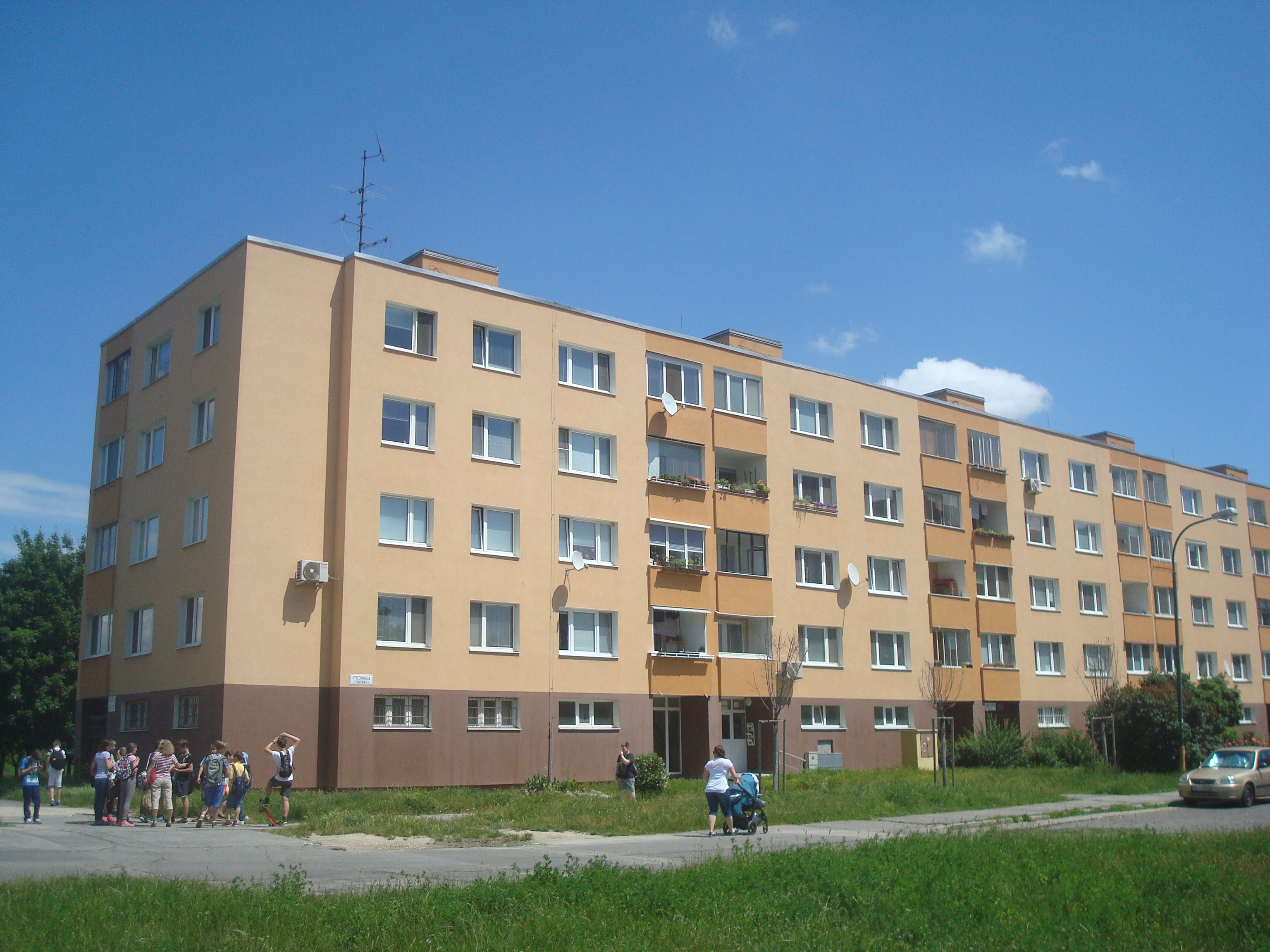 Strečnianska street house, Petržalka, Bratislava, Slovakia